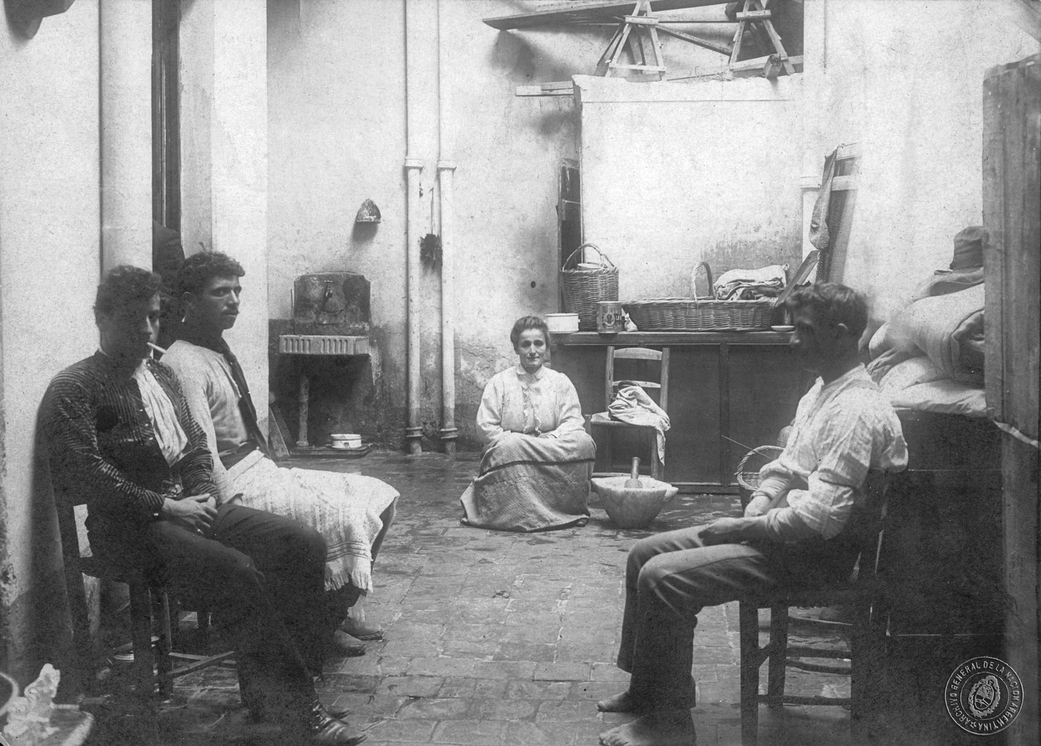 Patio de una casa de inmigrantes turcos, en el Pasaje Tres Sargentos, Buenos Aires c.1912. Documento Fotográfico. Inventario 155002.